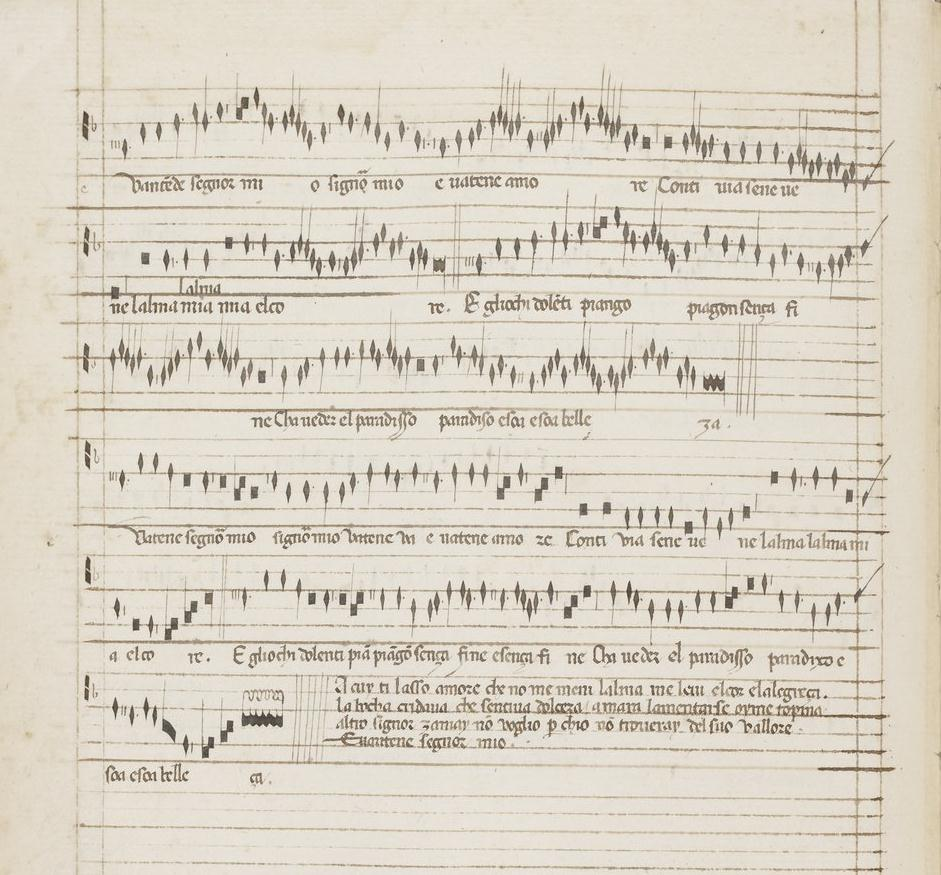 Codex Reina